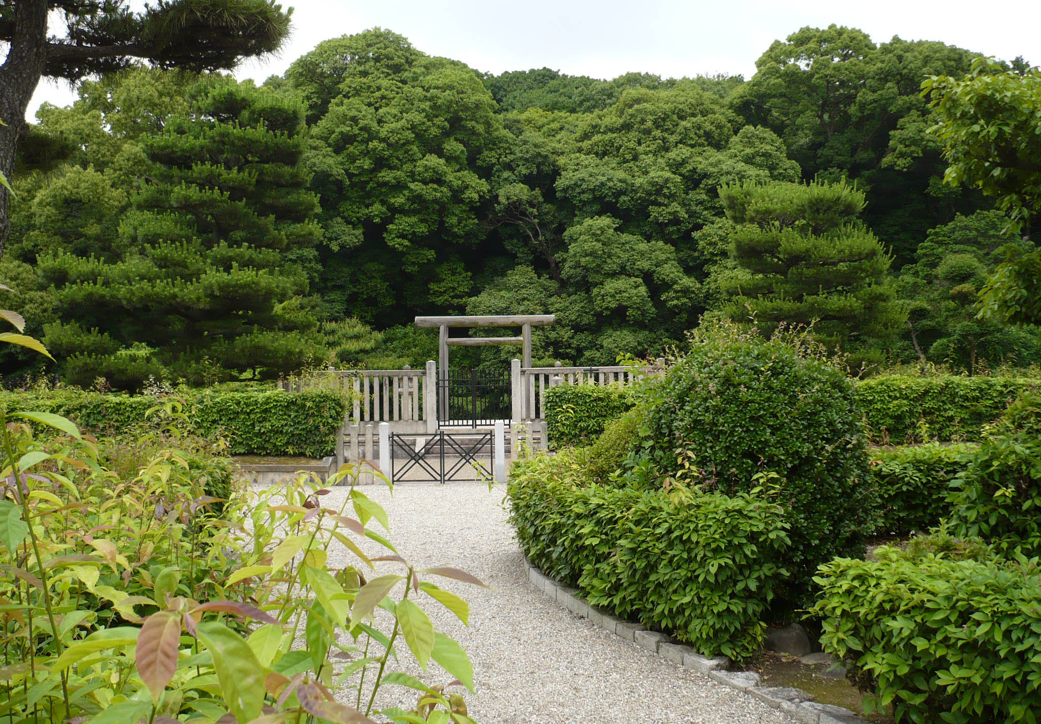 高屋築山古墳の拝殿